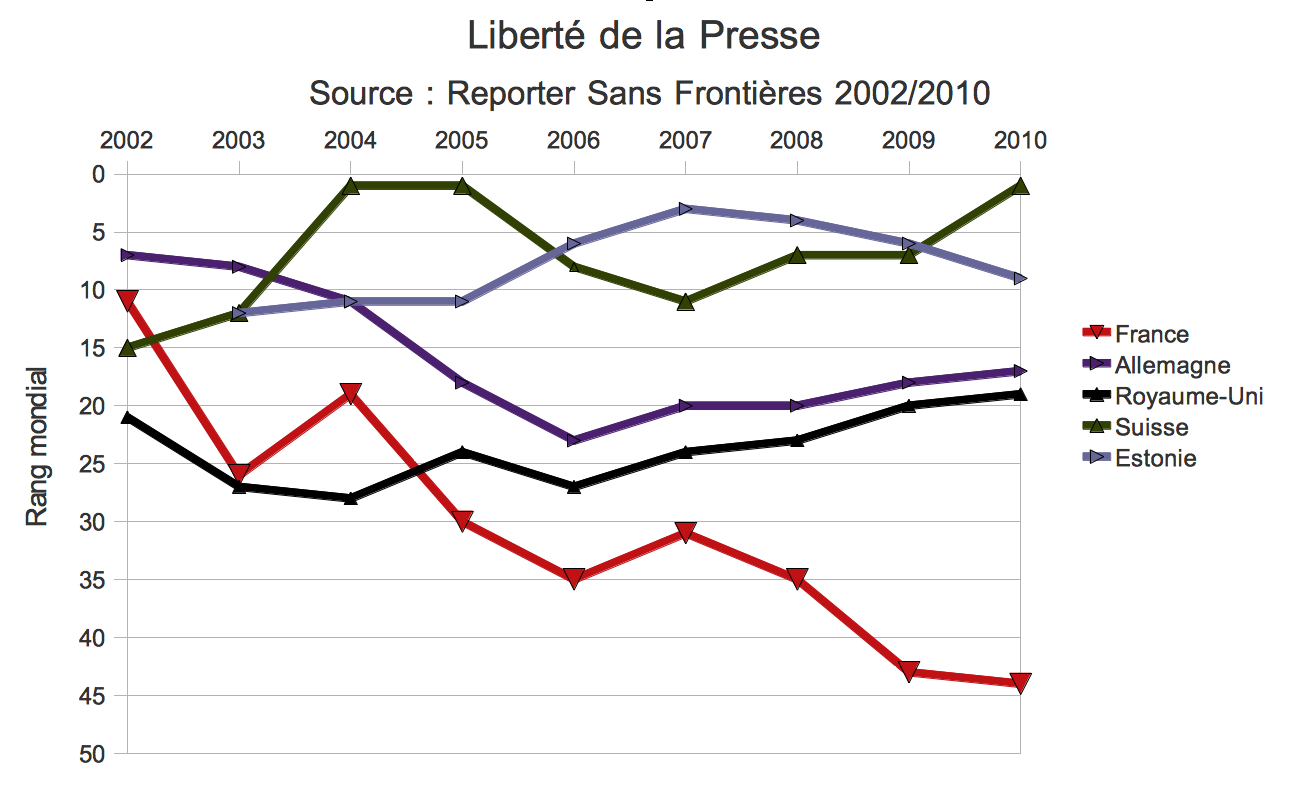 Courbes montrant l'évolution de la liberté de la presse dans divers pays européens selon le classement établi par Reporters Sans Frontières de 2002 à nos jours.